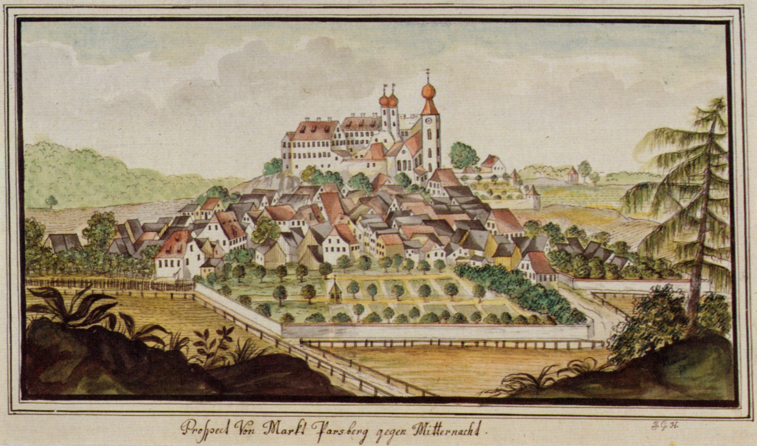 Die Stadt Parsberg in der Oberpfalz - kolorierte Zeichnung von Johann Georg Hämmerl der Jüngere (1770-1838).